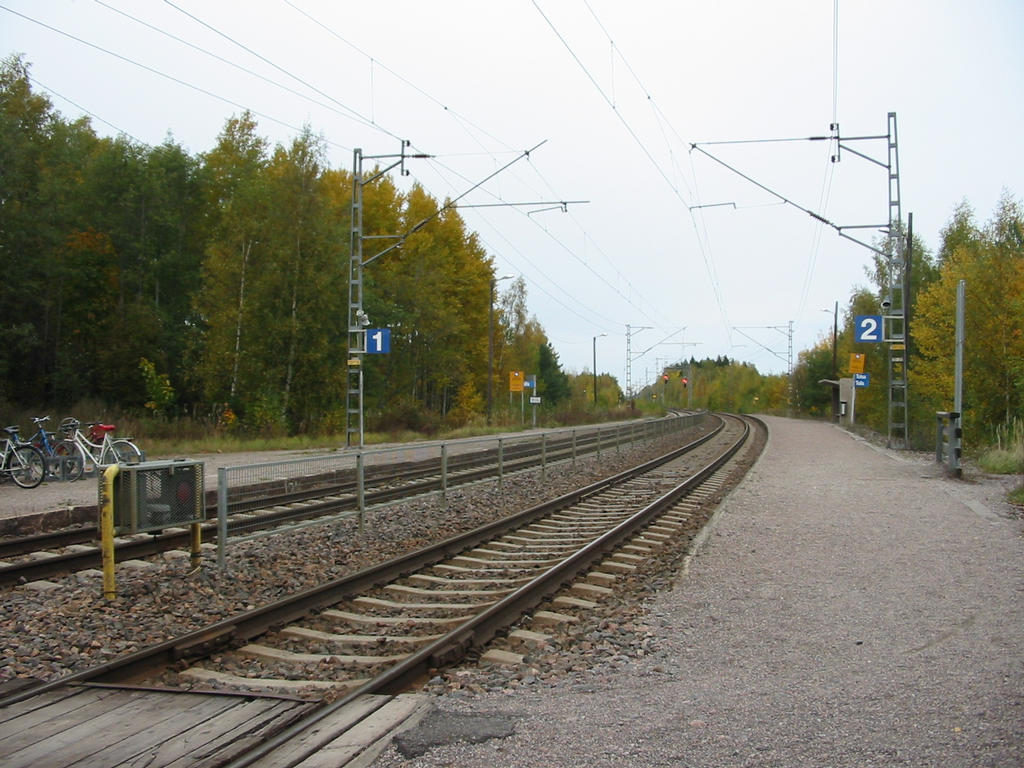 Tolsan seisake